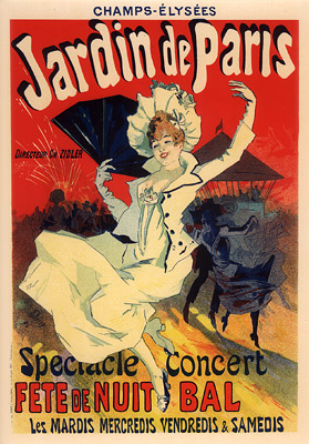 Jules Chéret (1836-1932): Champs-Elysées. Jardin de Paris. Spectacle-Concert, Fête de nuit, Bal, affiche pour l'établissement de divertissement Jardin de Paris (directeur Charles Zidler (1831-1897)), édité en 1890 [Imprimerie Chaix (Ateliers Chéret)], Paris, France.[1]